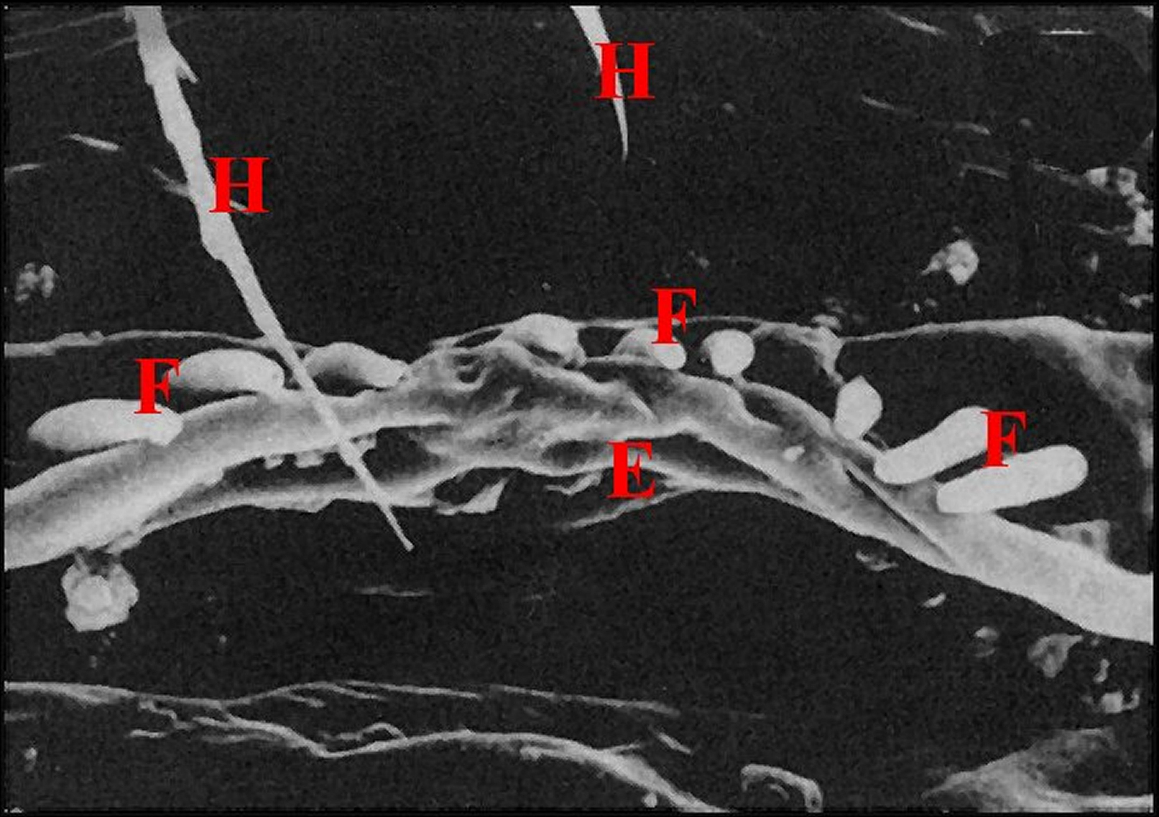 Ensemble des fusules épigastriques prégonoporales de Scytodes thoracica mâle. Microscope électronique à balayage.